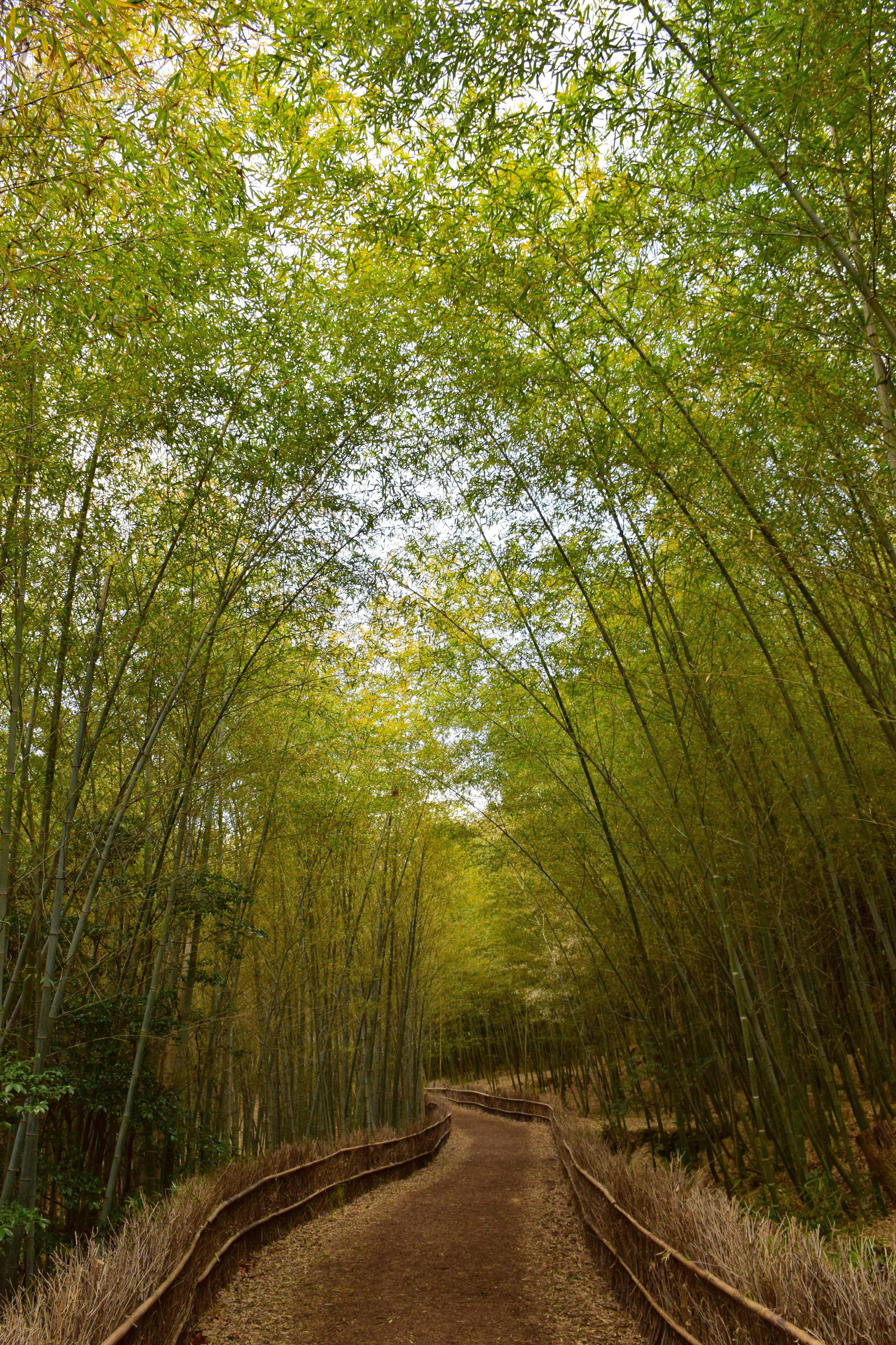 大高緑地の竹林